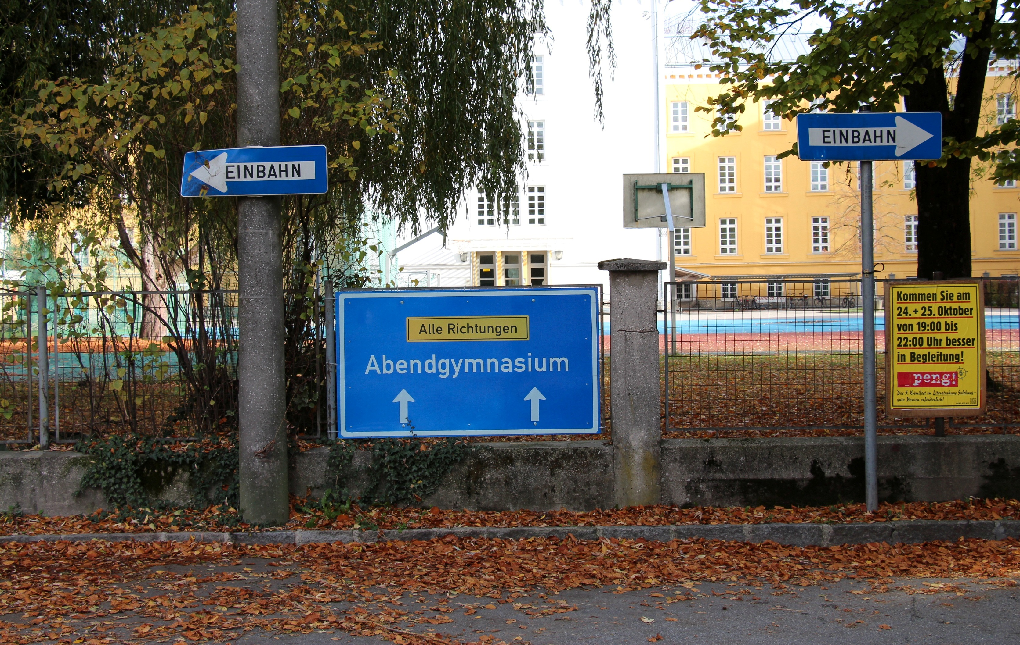 Teilansicht des Christian-Doppler-Gymnasiums in Salzburg von der Rückseite. Das Gebäude beherbergt auch das Salzburger Abendgymnasium.